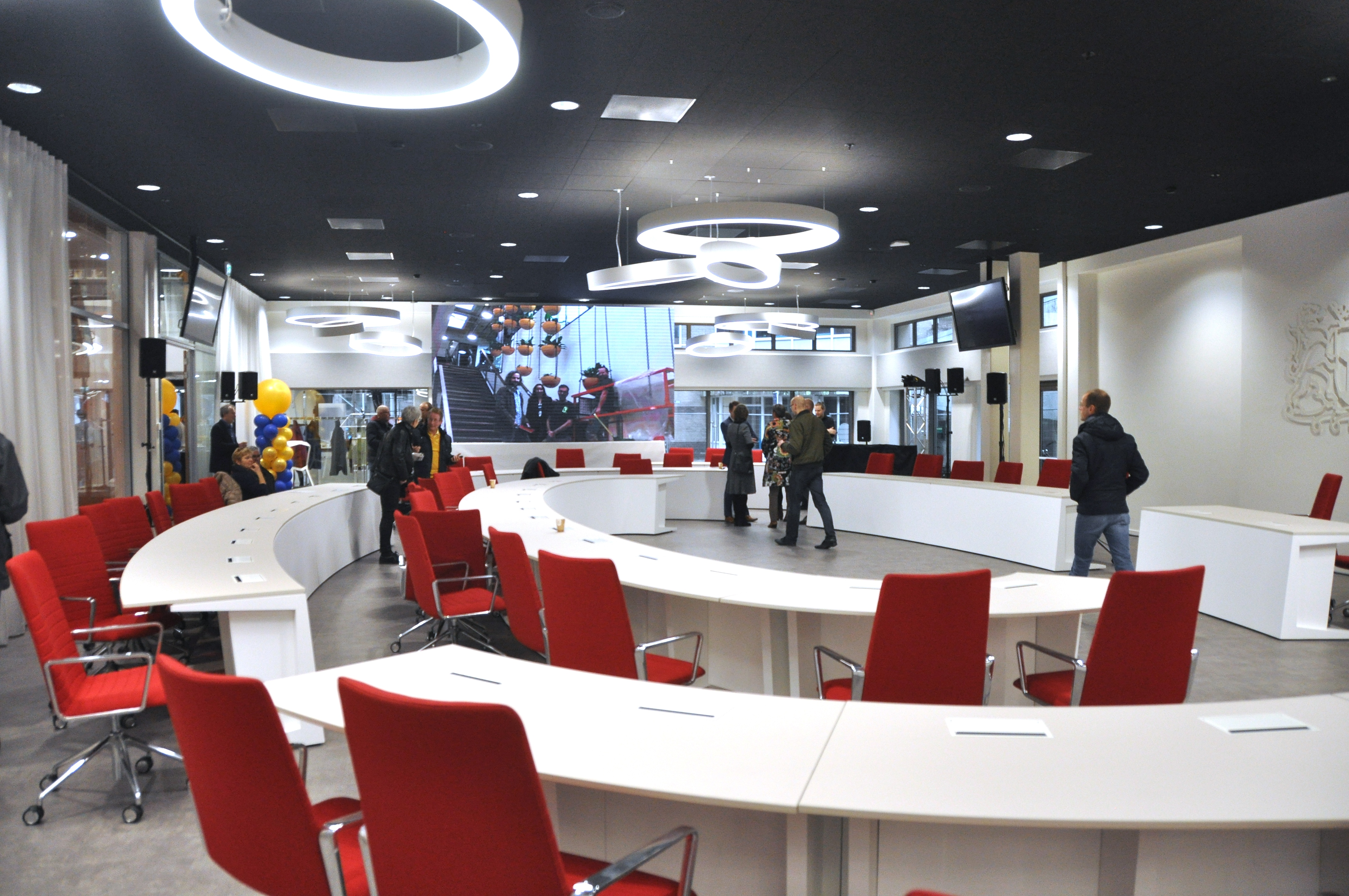 Open dag van het verbouwde stadhuis Zoetermeer.